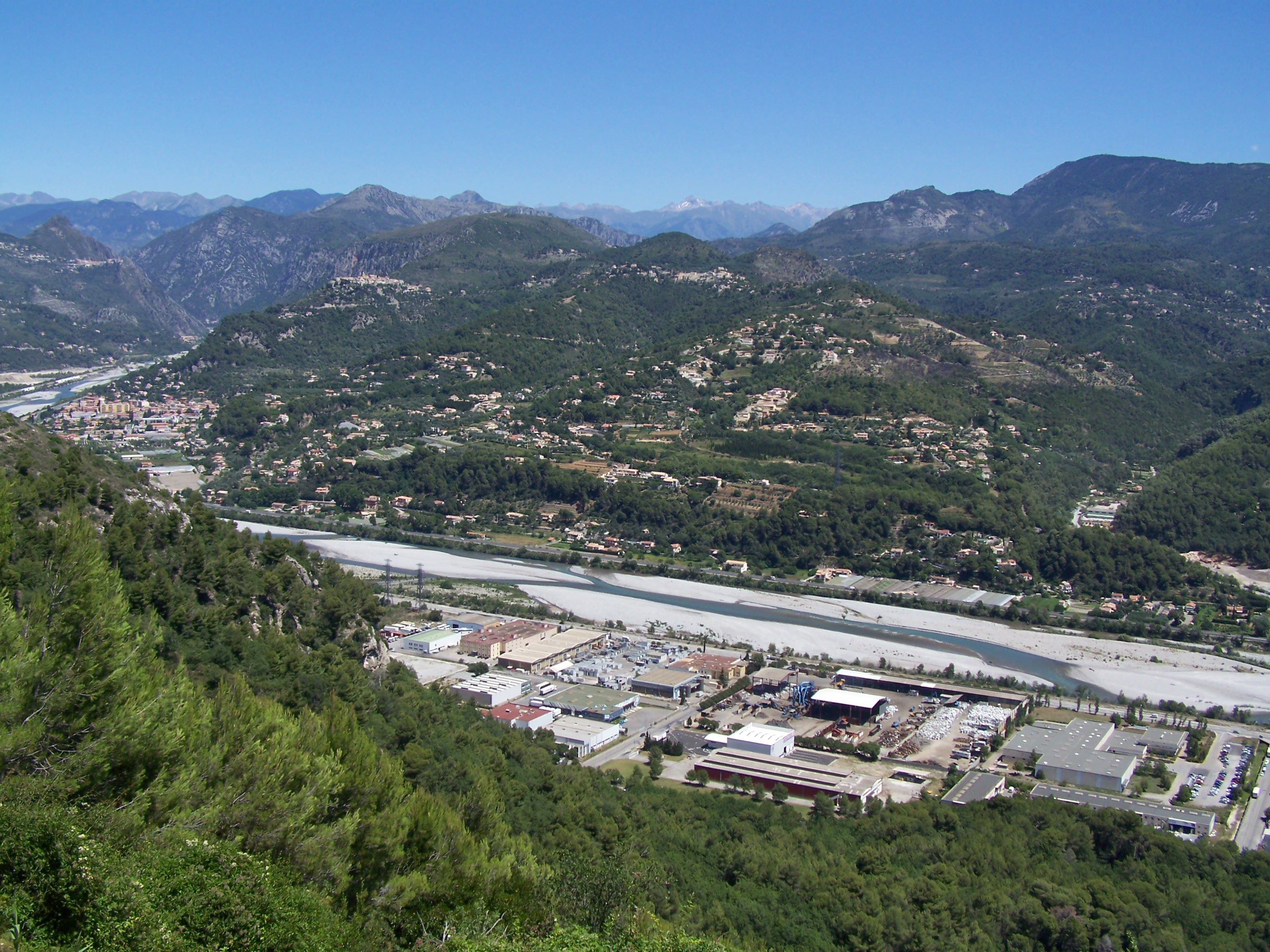 La partie finale de la vallée du fleuve Var (Alpes-maritimes, France) juste après son confluent avec les rivières Vésubie et Estéron. Sur cette photographie prise du belvédère de Carros, on peut voir en bas et au milieu la zone industrielle de Carros, en haut et à droite la chaîne du Férion (1412m) et en arrière-plan les sommets frontaliers entre la France et l'Italie (avec de la neige résiduelle sur le Gelas, point culminant du département à 3143m).